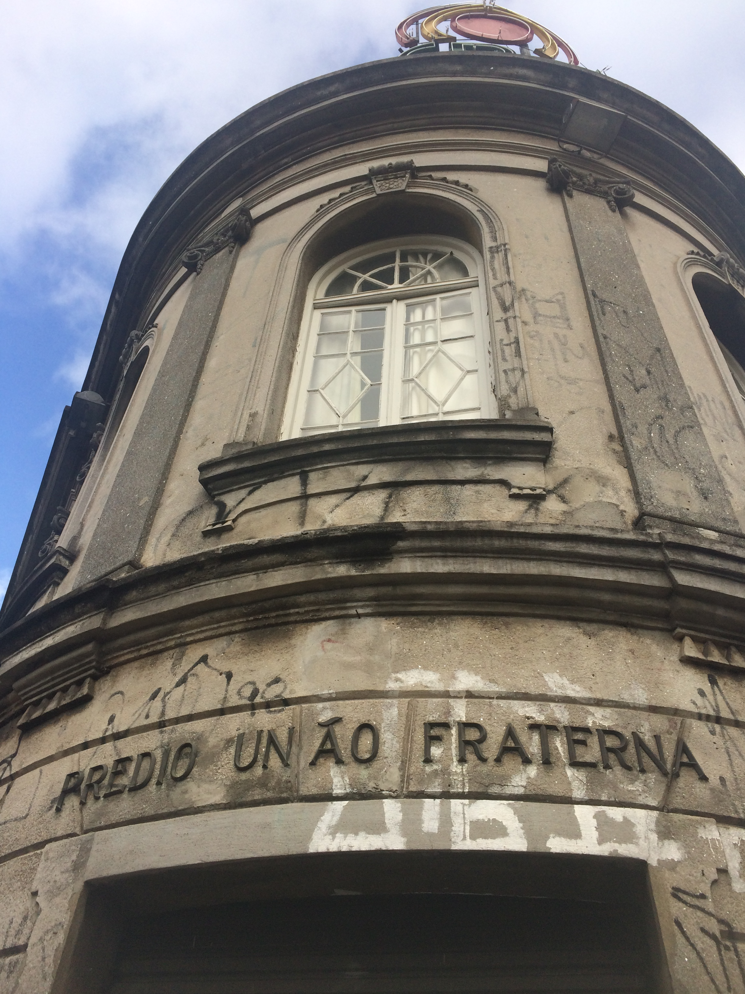 O edifício da Sociedade Beneficente União Fraterna está localizado na esquina das ruas Guaicurus e Faustolo, no bairro Água Branca, Zona Oeste de São Paulo.